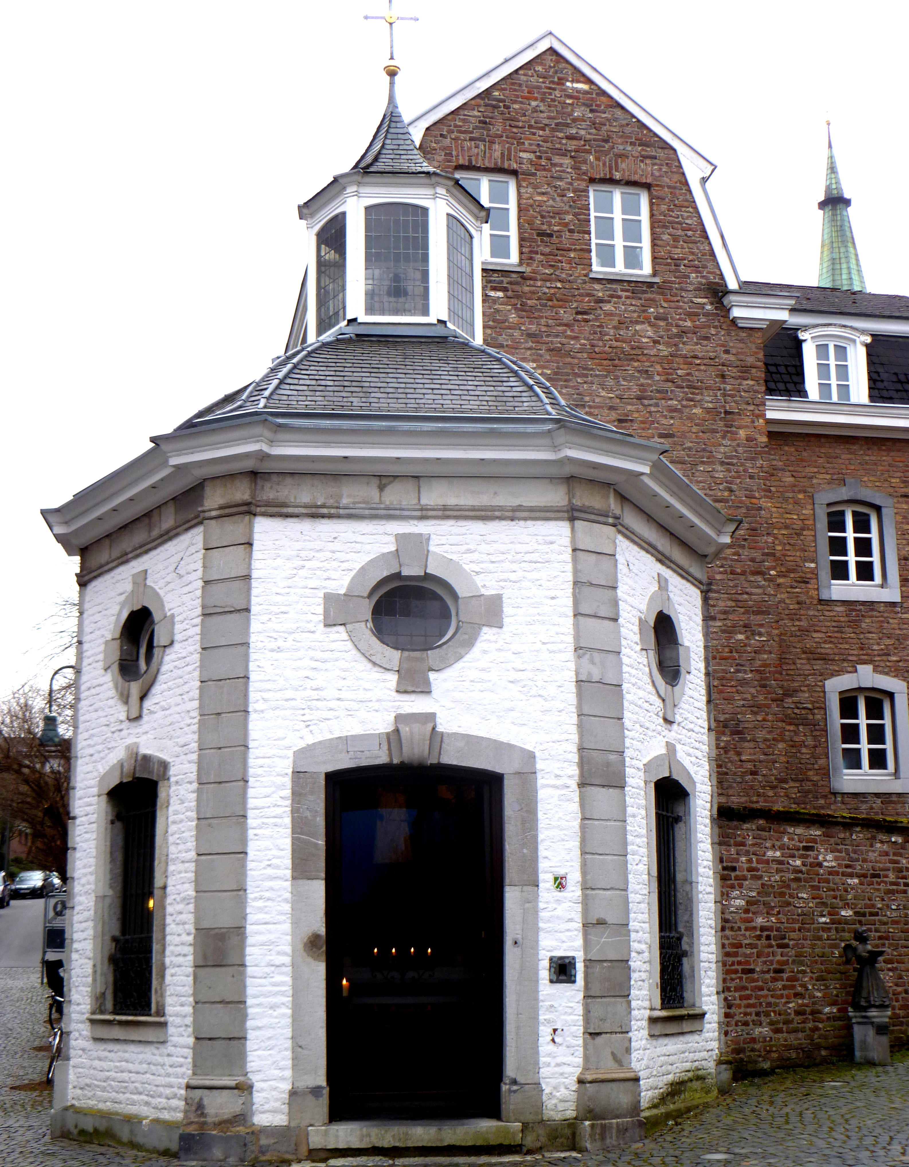 Roskapellchen Aachen - Vorderansicht